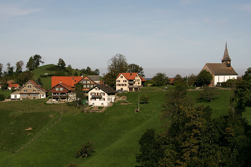 Sternenberg